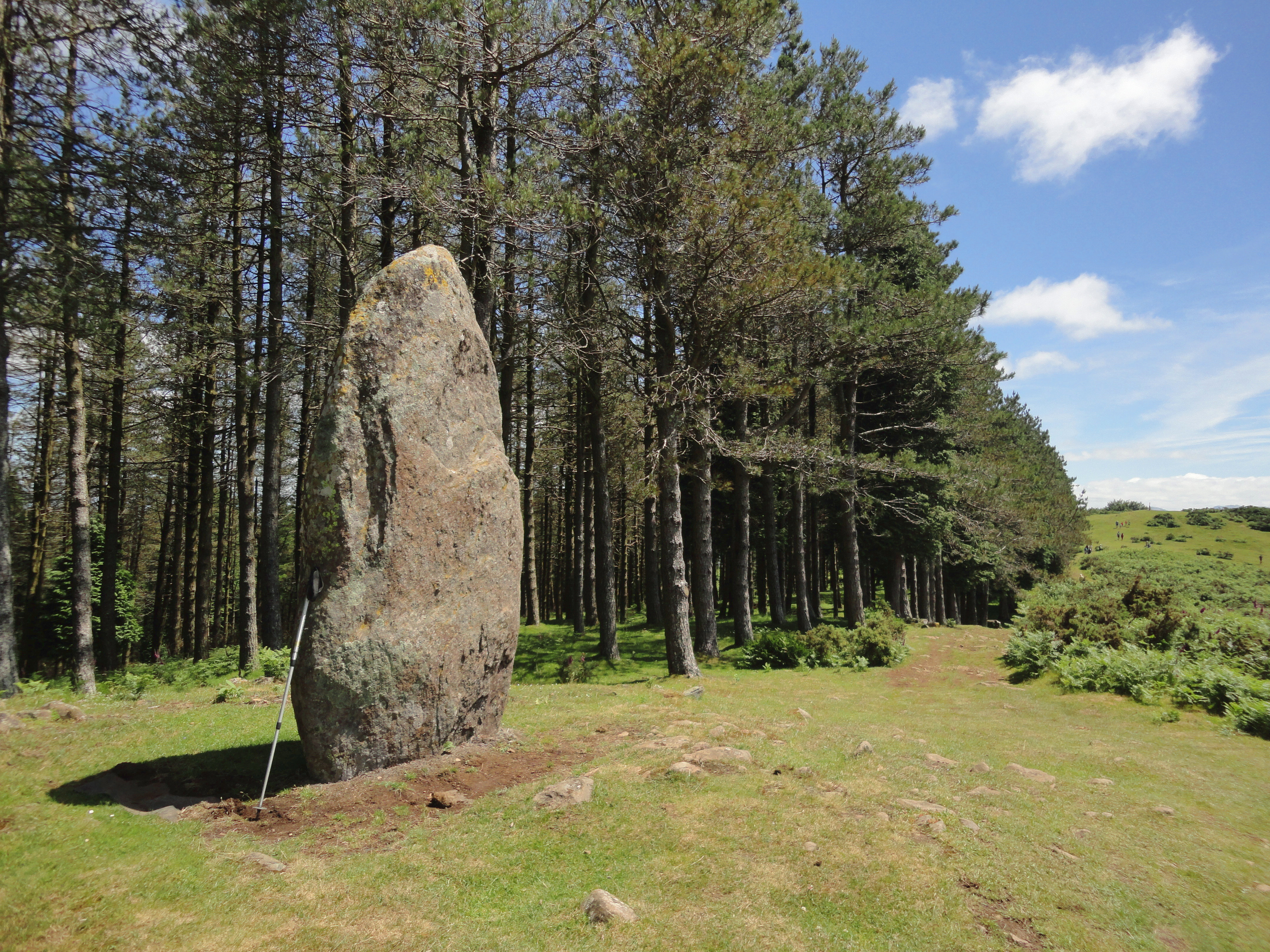 Arribiribilleta zutarria